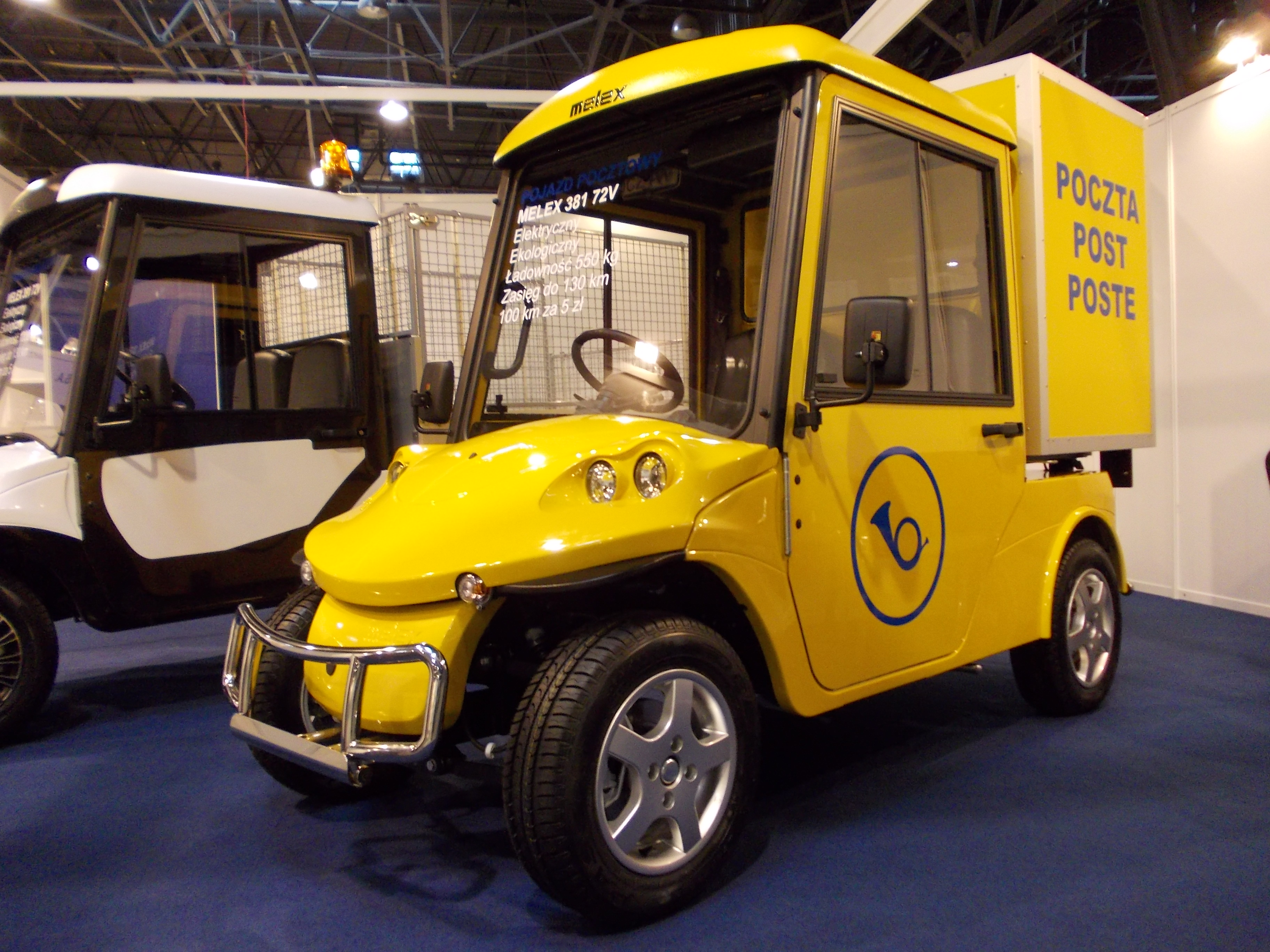 Melex 381 72V pocztowy podczas SilesiaKOMUNIKACJA 2014 w Sosnowcu.